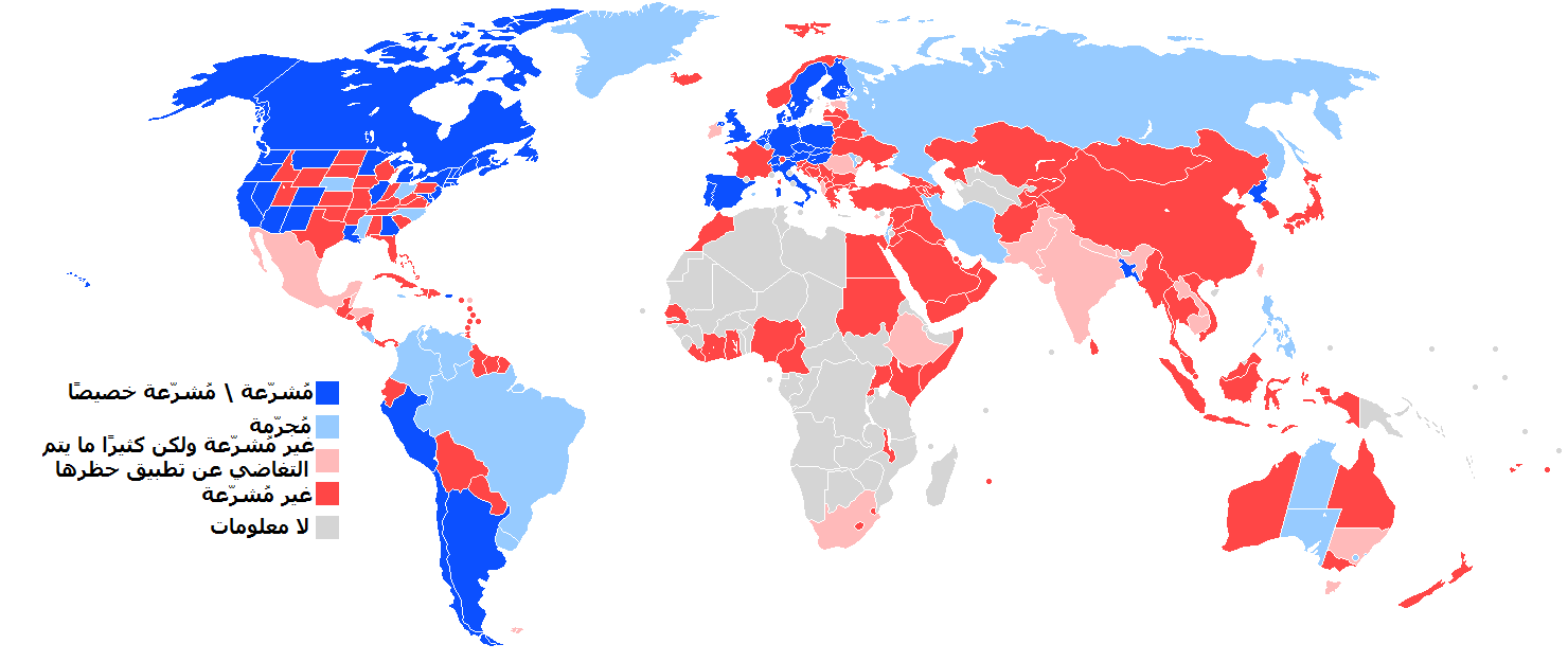 خارطة تُبيِّن الدُول التي تسمح بتداول واستعمال الحشيشة بشكلٍ قانونيّ.